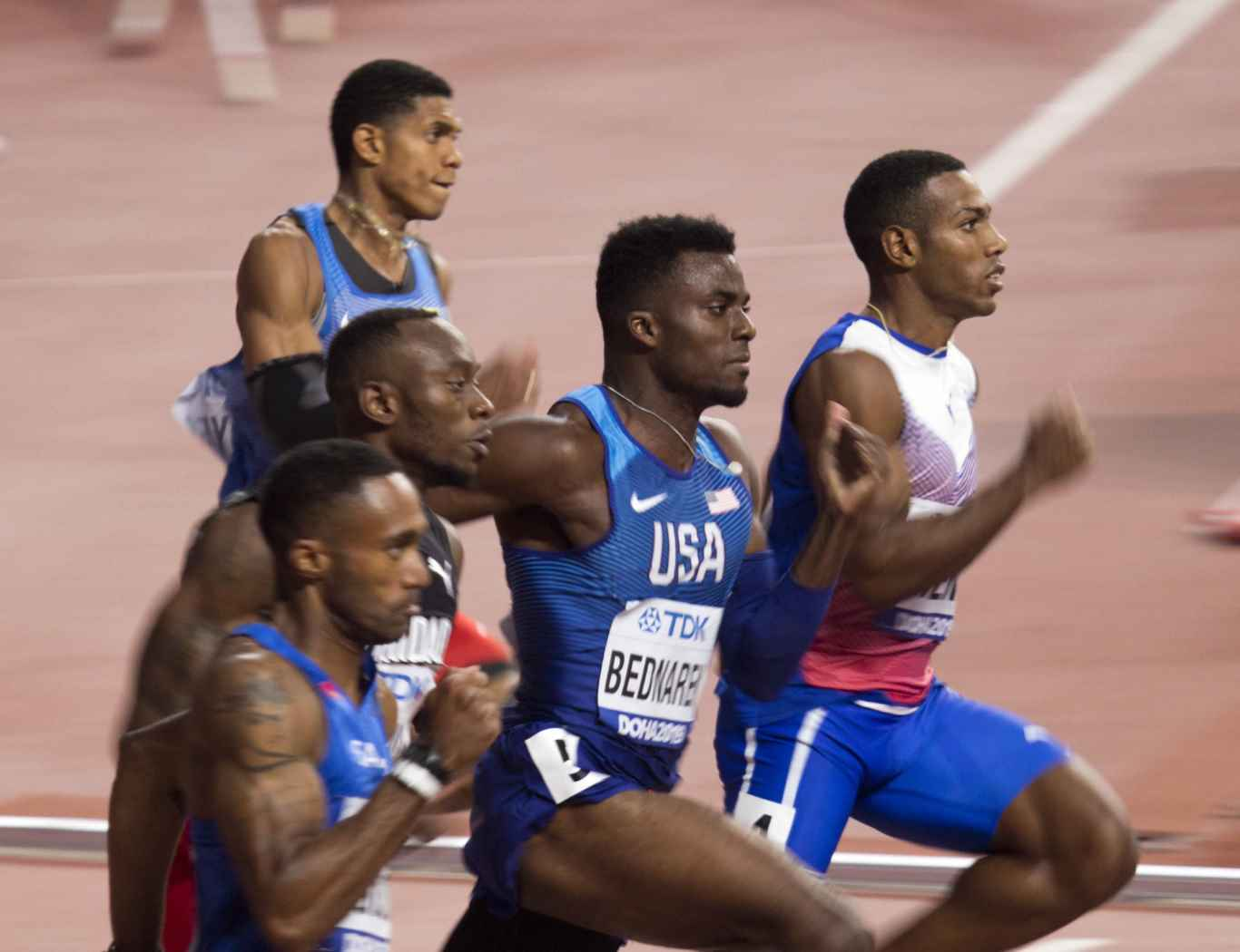 DOH30025 200m men heats